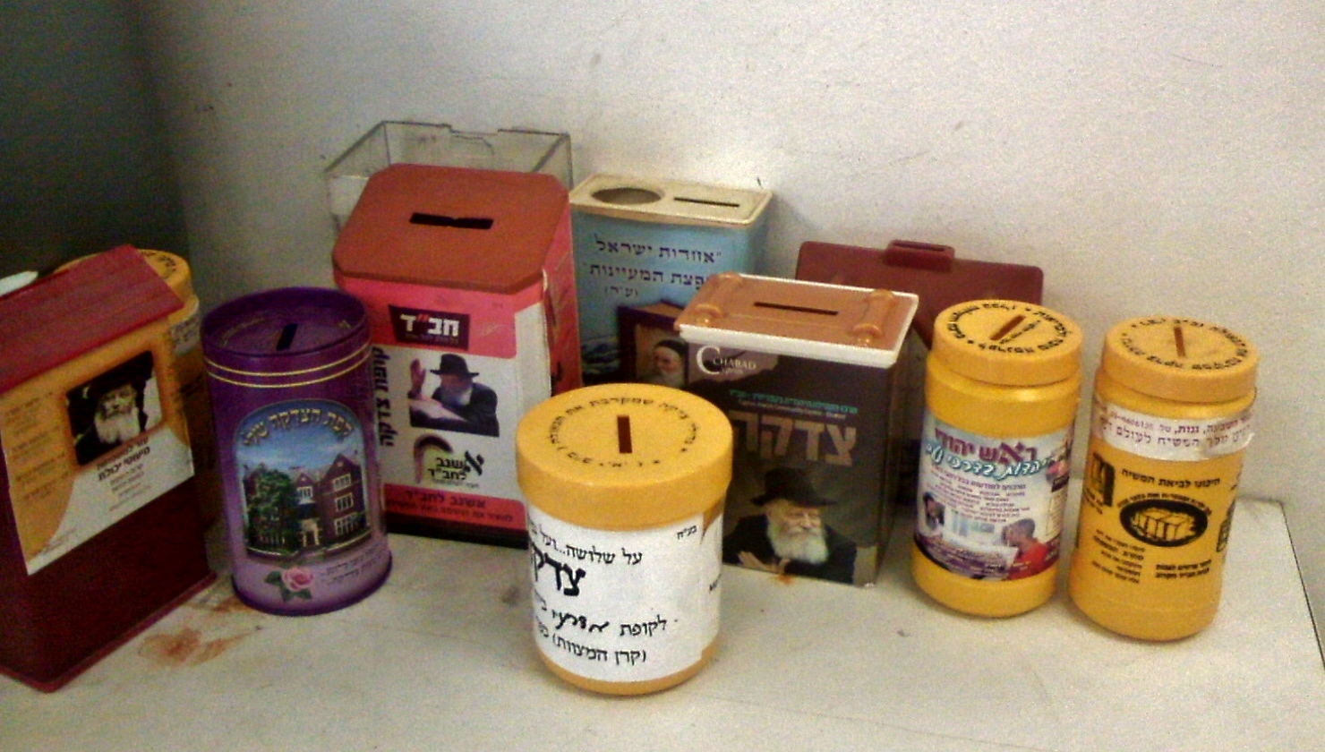 מבחר קופות צדקה ניידות